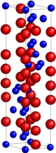 Structure du composé intermétallique W6Fe7 avec Fe en bleu et W en rouge.